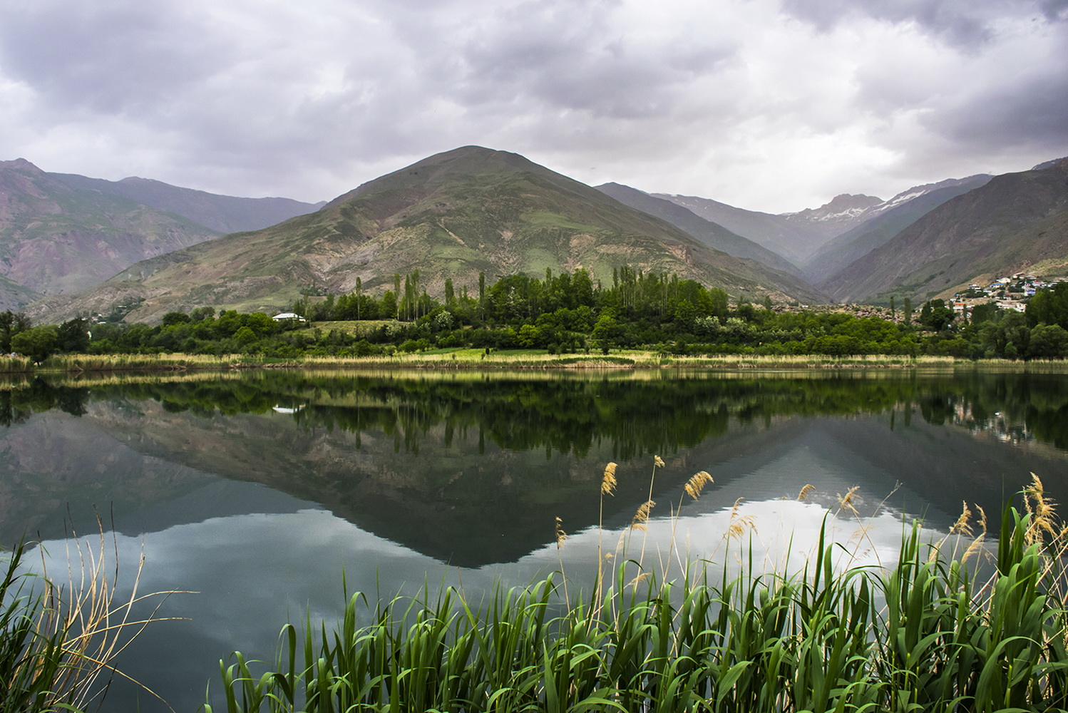 دریاچه زیبای اوان در نیمه شمالی الموت، در دامنه کوه خشچال، در فاصله ۷۵ کیلومتری قزوین و در میان چهار روستای اوان، وربن، زواردشت و زرآباد شهر قزوین قرار دارد. این دریاچه که بیش از هفتاد هزار متر مربع مساحت دارد، در ارتفاع هزار و هشتصد و پانزده متری از سطح دریا واقع شده‌است. طول آن در طویل‌ترین قسمت ۳۲۵ متر و عرض آن ۲۷۵ متر می‌باشد.